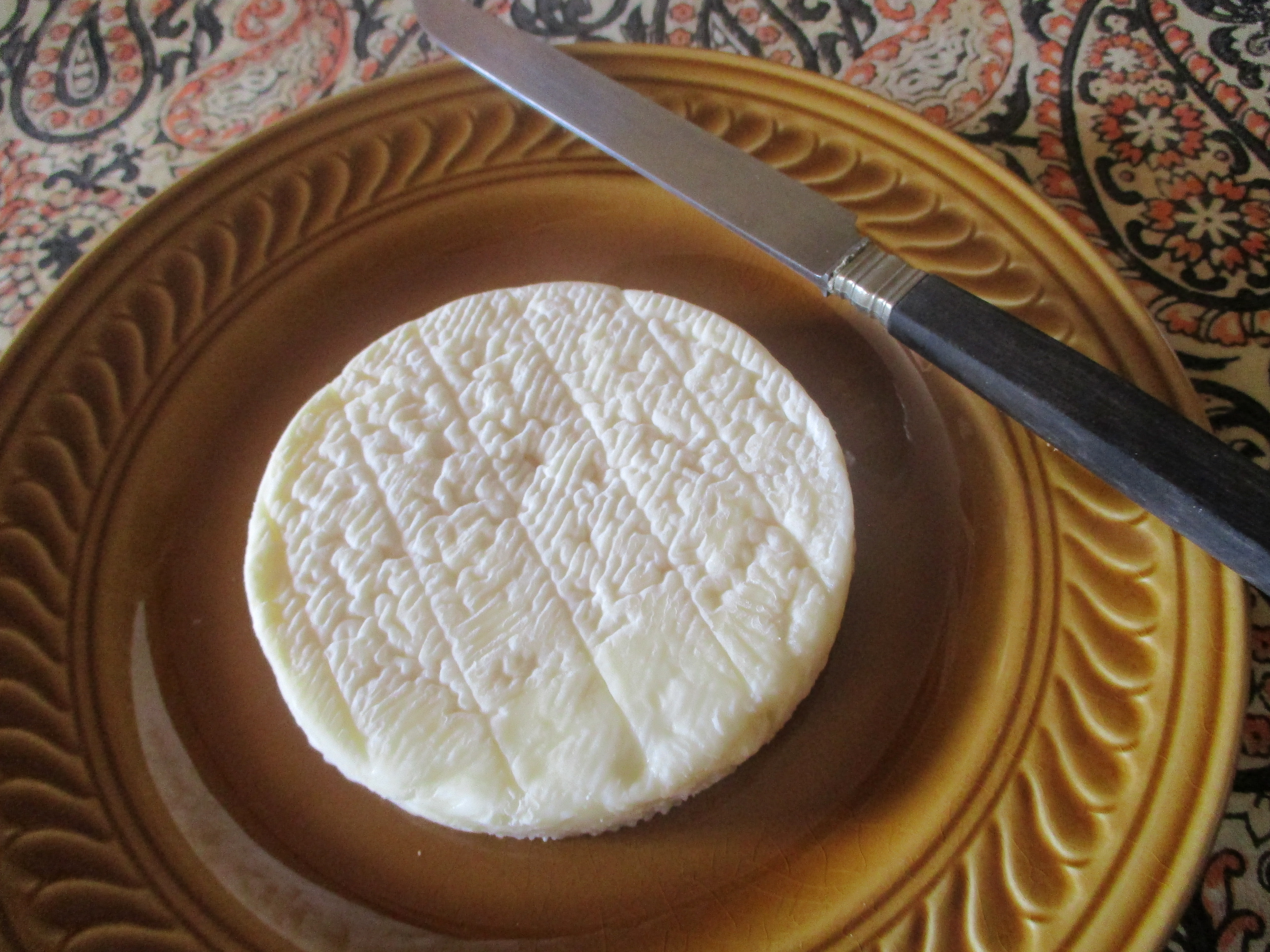 Fromage de chèvre pérail.